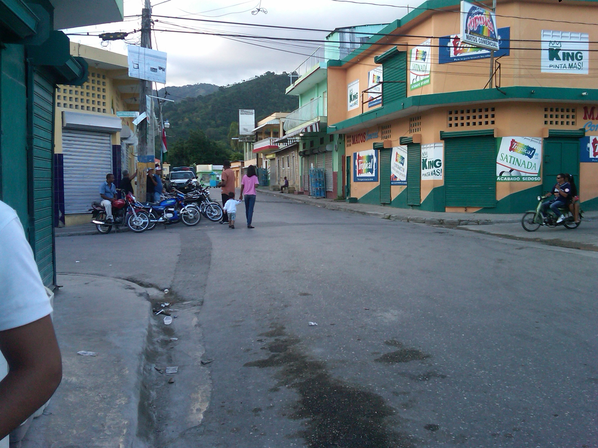 Calle Cambita Garabitos